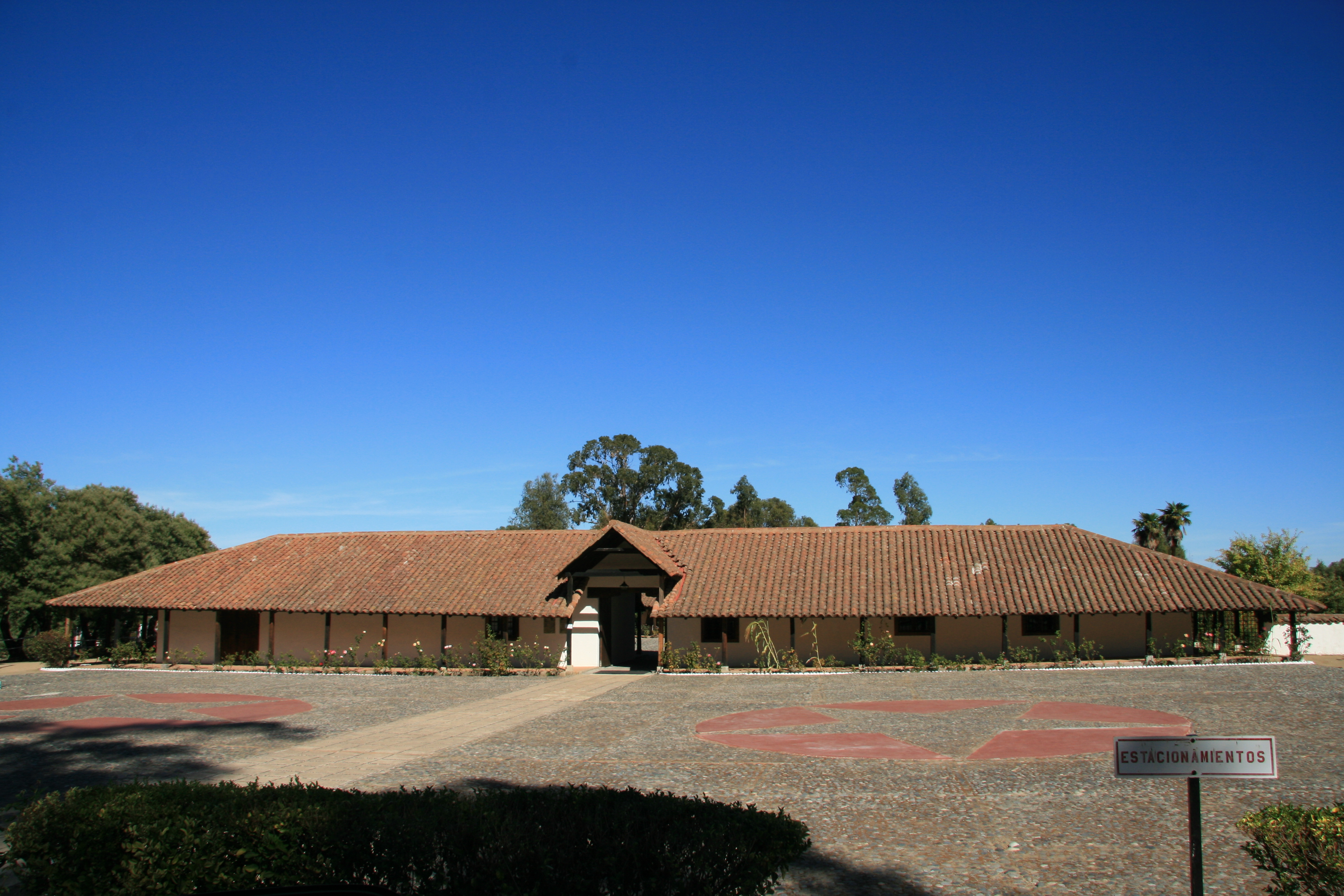 Casa cuna de Arturo Prat y terrenos adyacentes This is a photo of a national monument in Chile: 1428